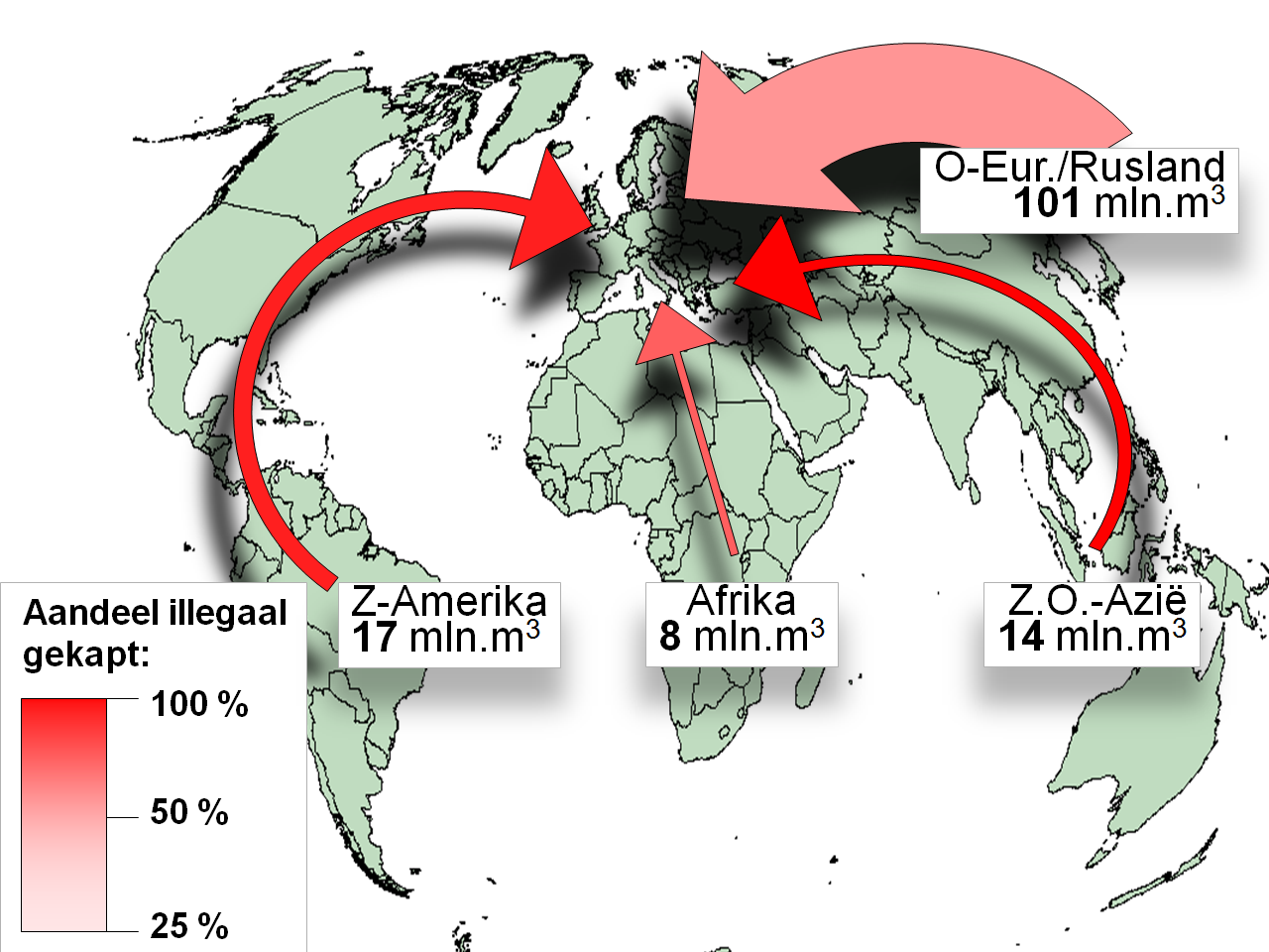 Wereldhandel hout tbv EU